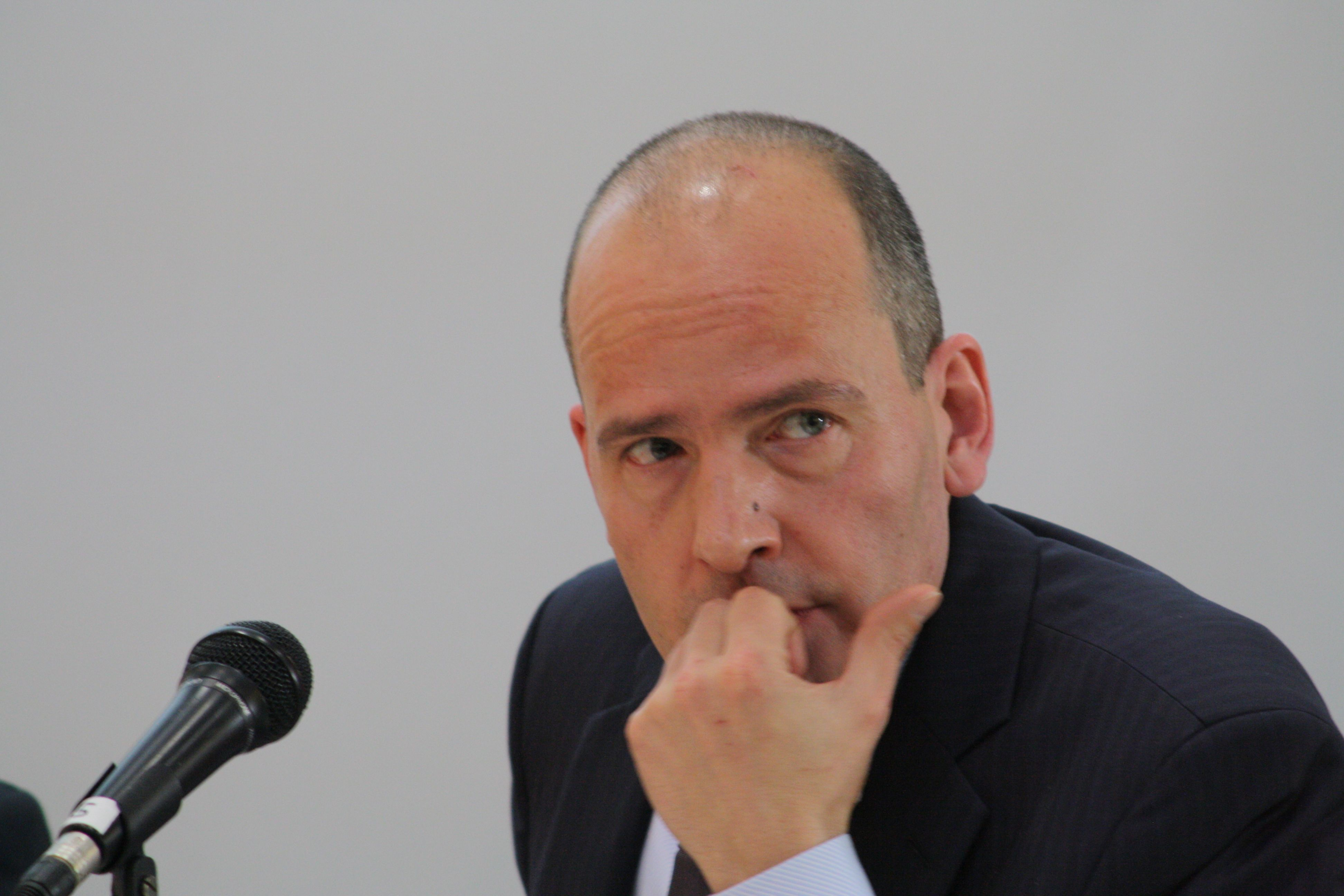 Journalist und Autor